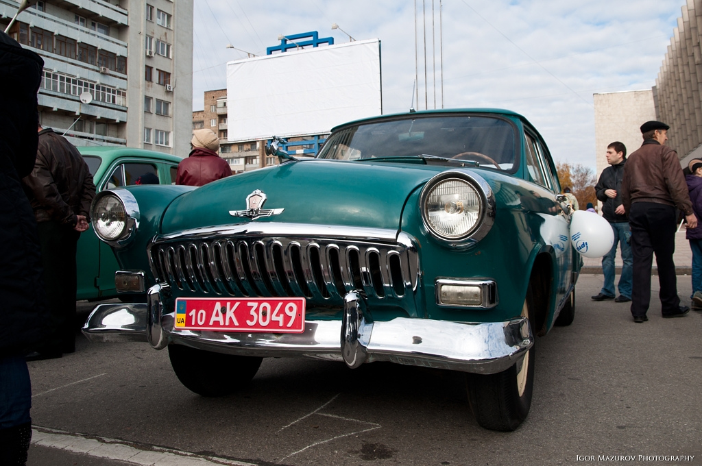 Gaz 21 "Volga"